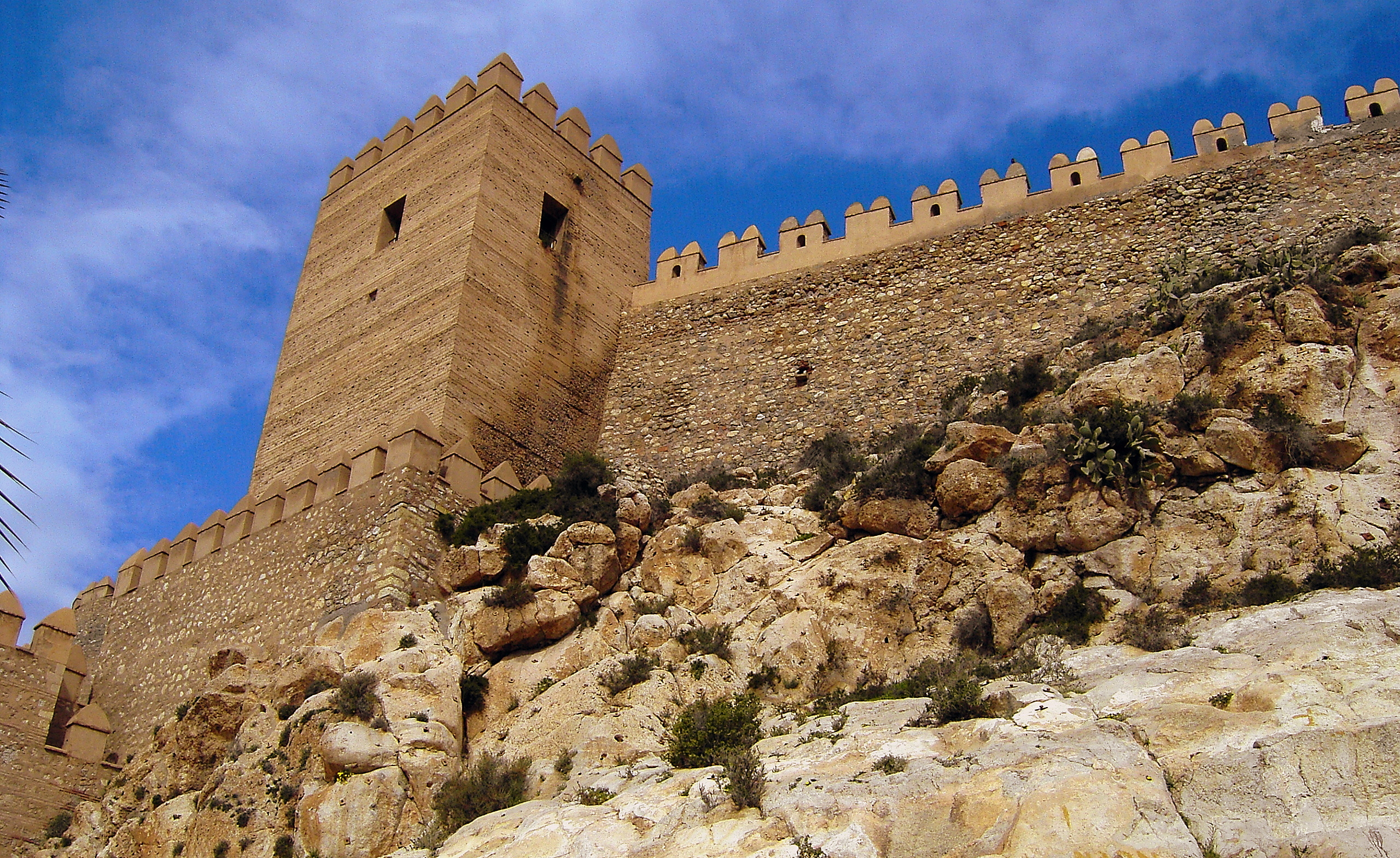 Alcazaba de Almería (2007)